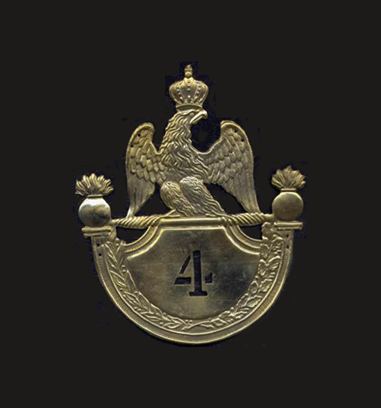 Insigne de czako du 4e régiment d'infanterie à 1815